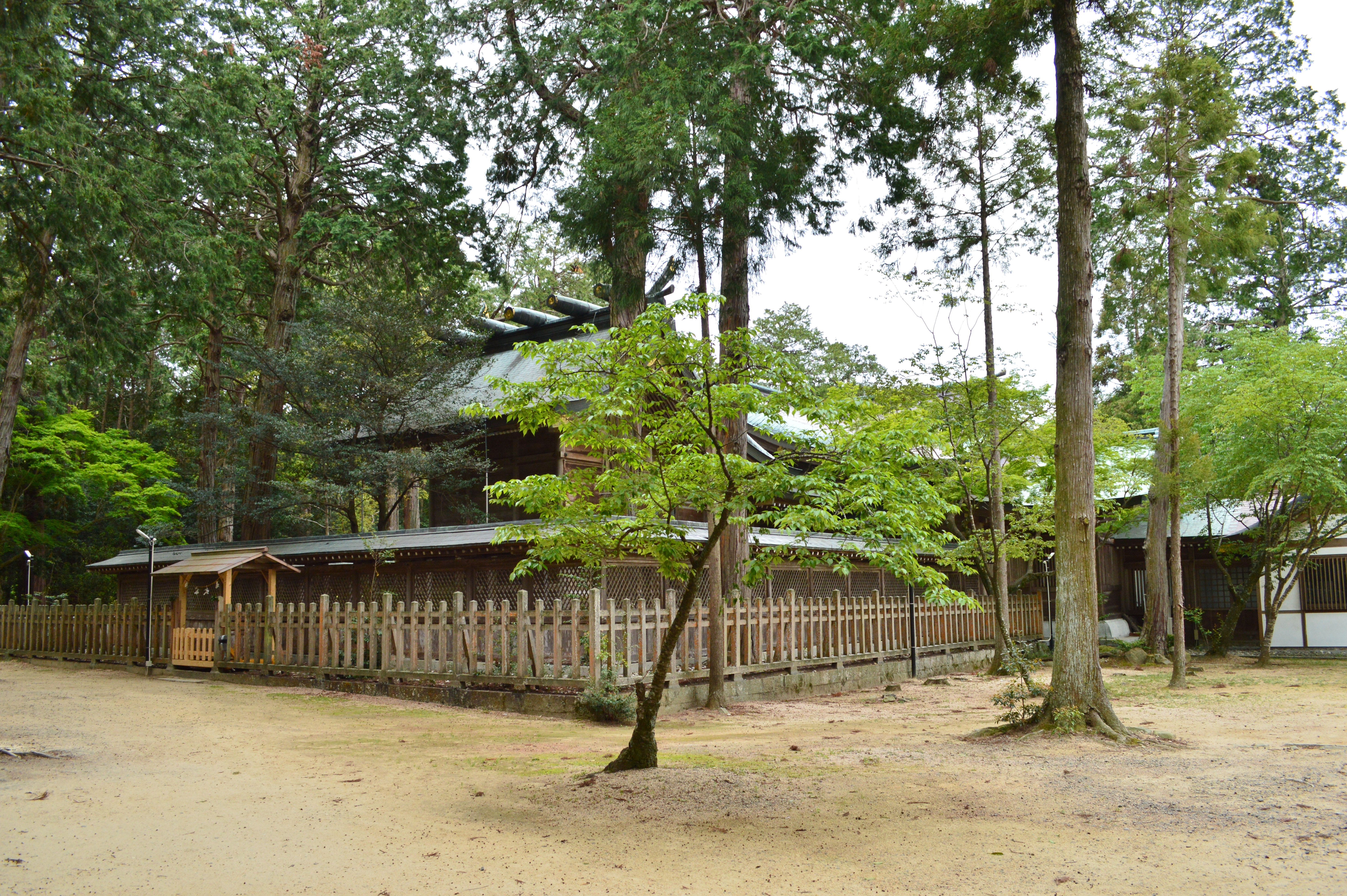 大麻比古神社 本殿 Nikon D3200